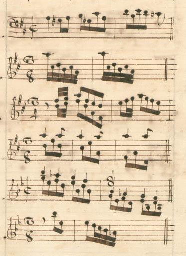 Table du volume X des manuscrits de Parme (incipit des sonates 9 à 14, K. 368-371).